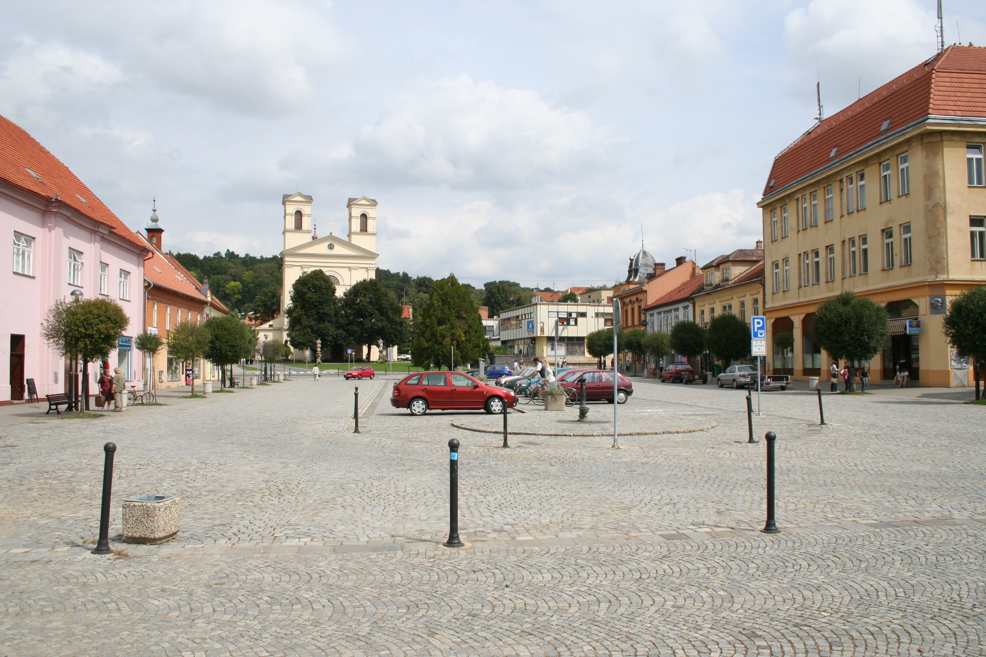 Pohled na náměstí Svobody v Bučovicích